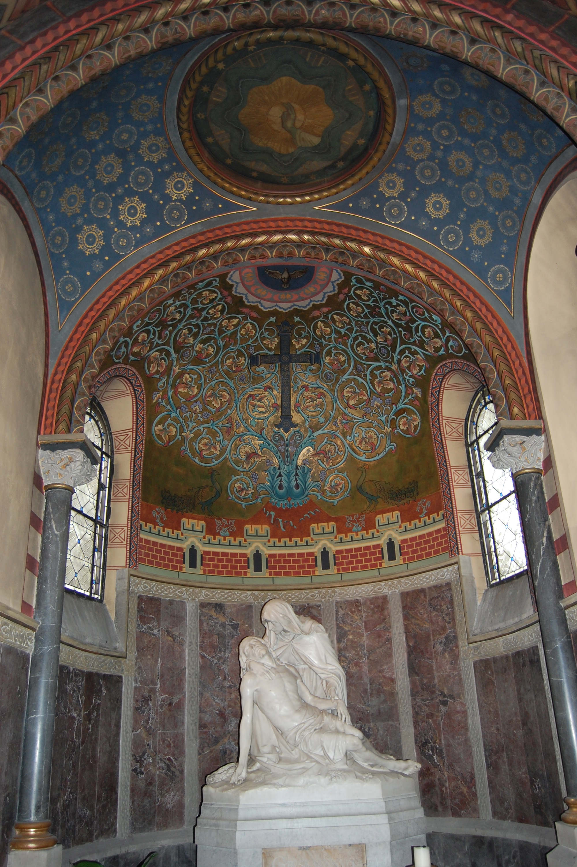 Pietakaplle St.Gereon, Pietà von Josef Reiss